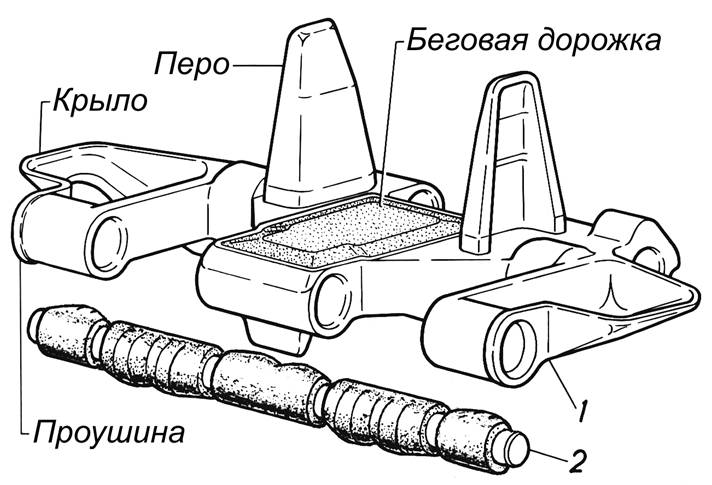 Звено гусеницы и палец (применяется на снегоболотоходах ГАЗ-34039)